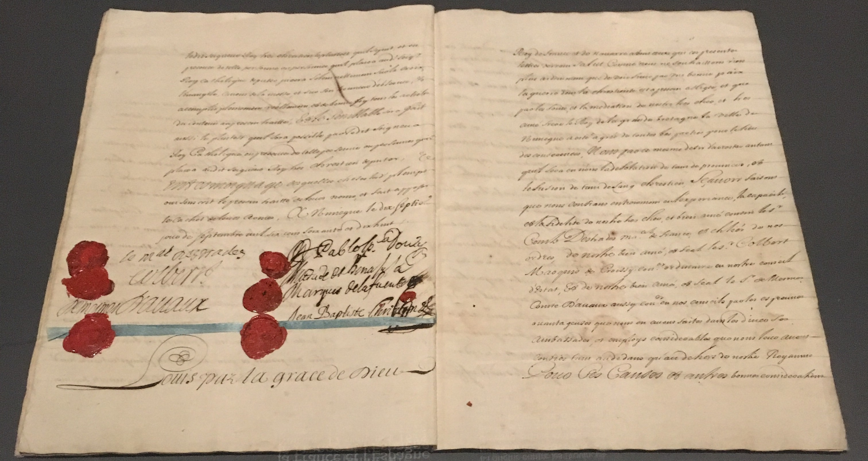 Traité de paix entre la France et l'Espagne. Nimègue, 17 septembre 1678.